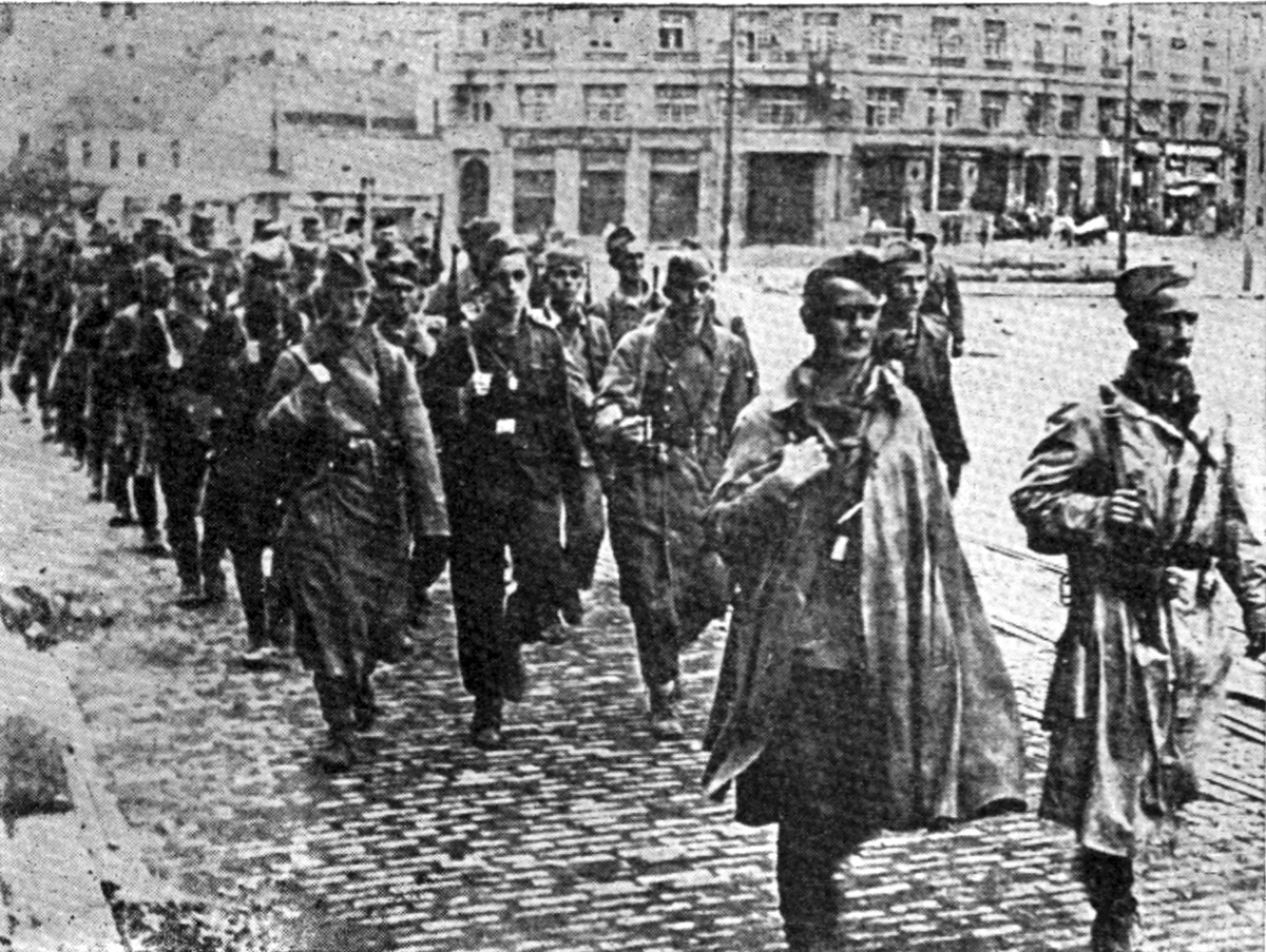 Srpskohrvatski / српскохрватски: Partizanske jedinice na budućem Trgu Republike u oslobođenom Beogradu 1944.